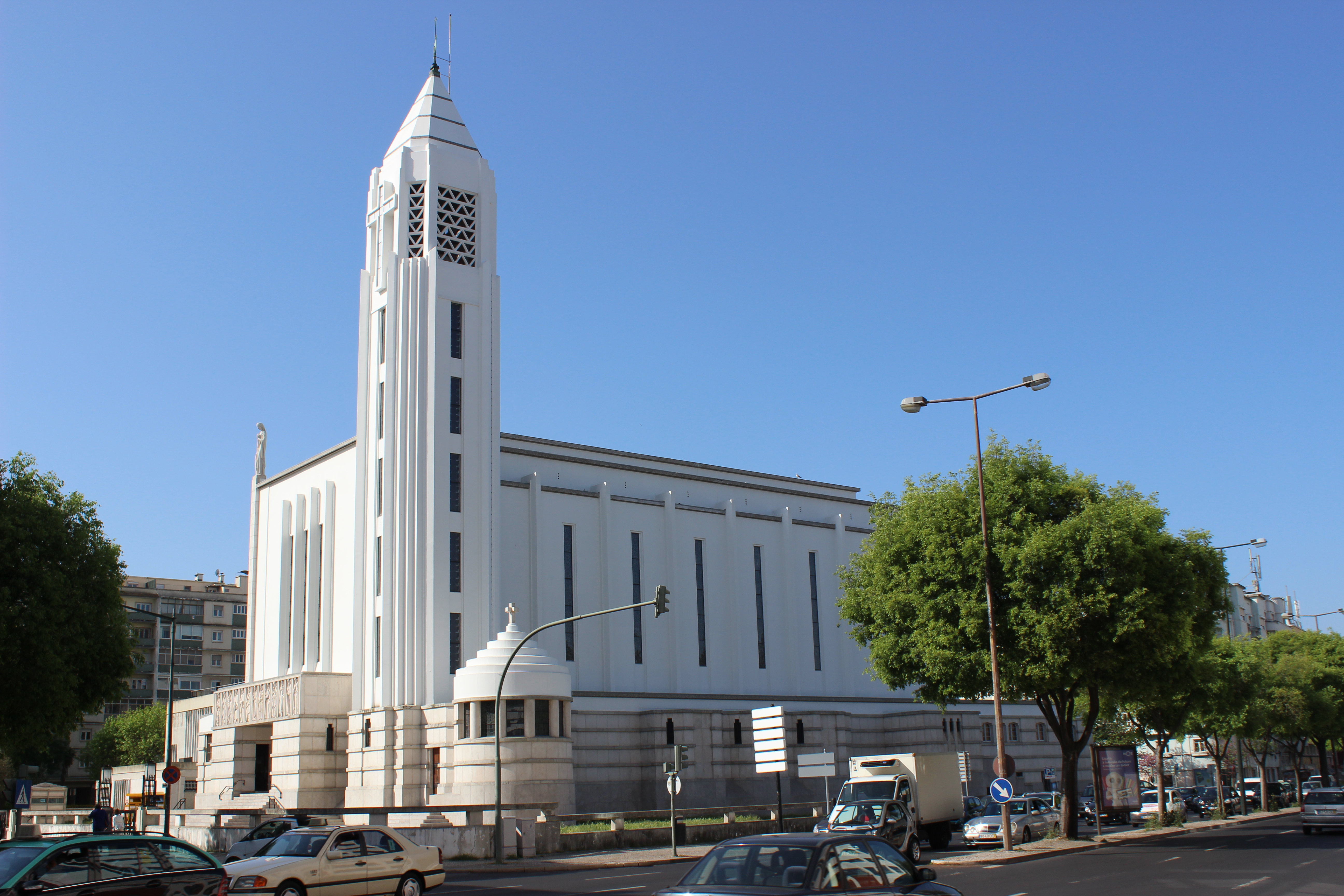 Lisboa / Lisbon